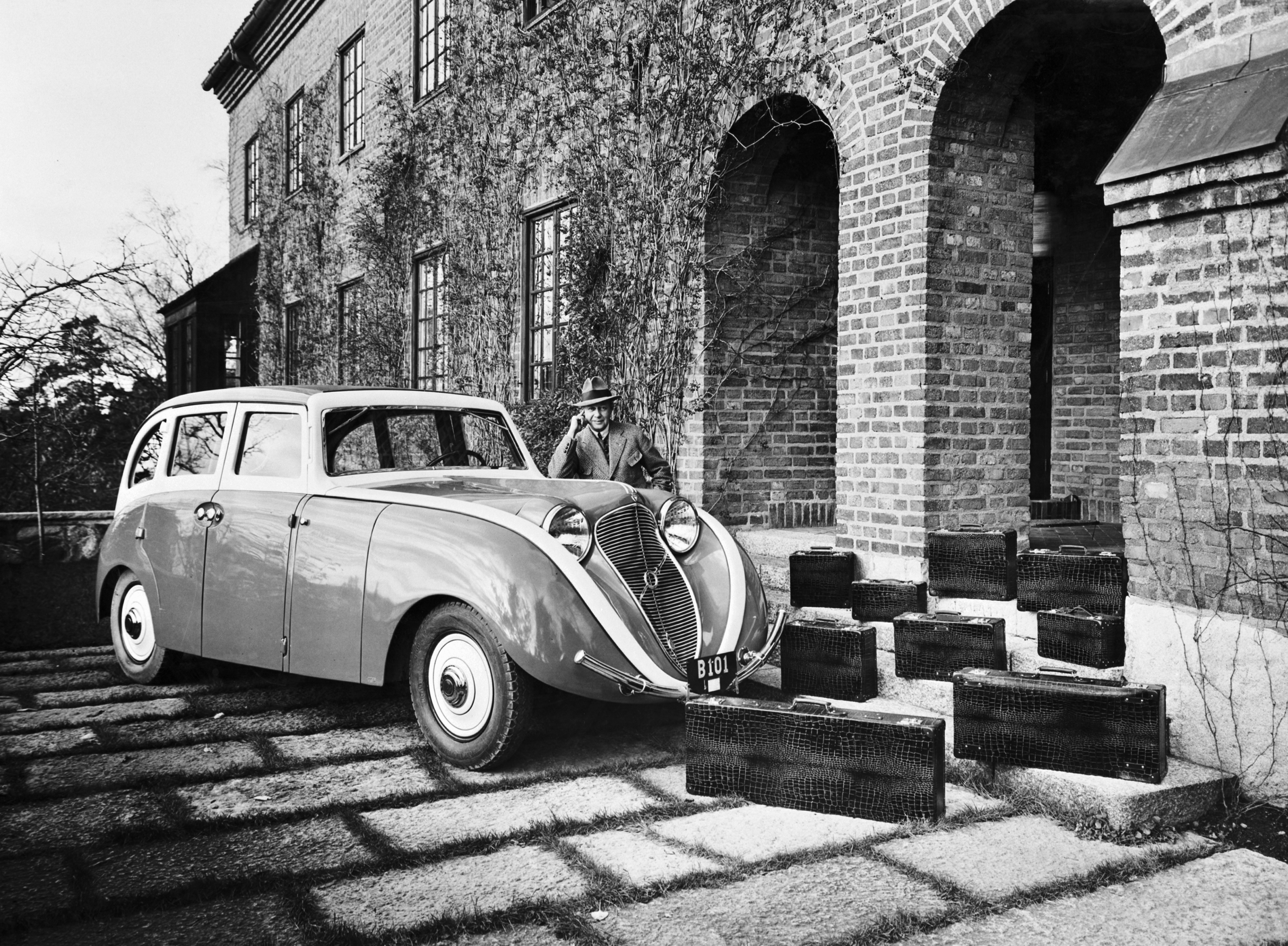 Gustaf L.M. Ericsson vid sin designade bil Venus Bilo, med tillhörande väskor.